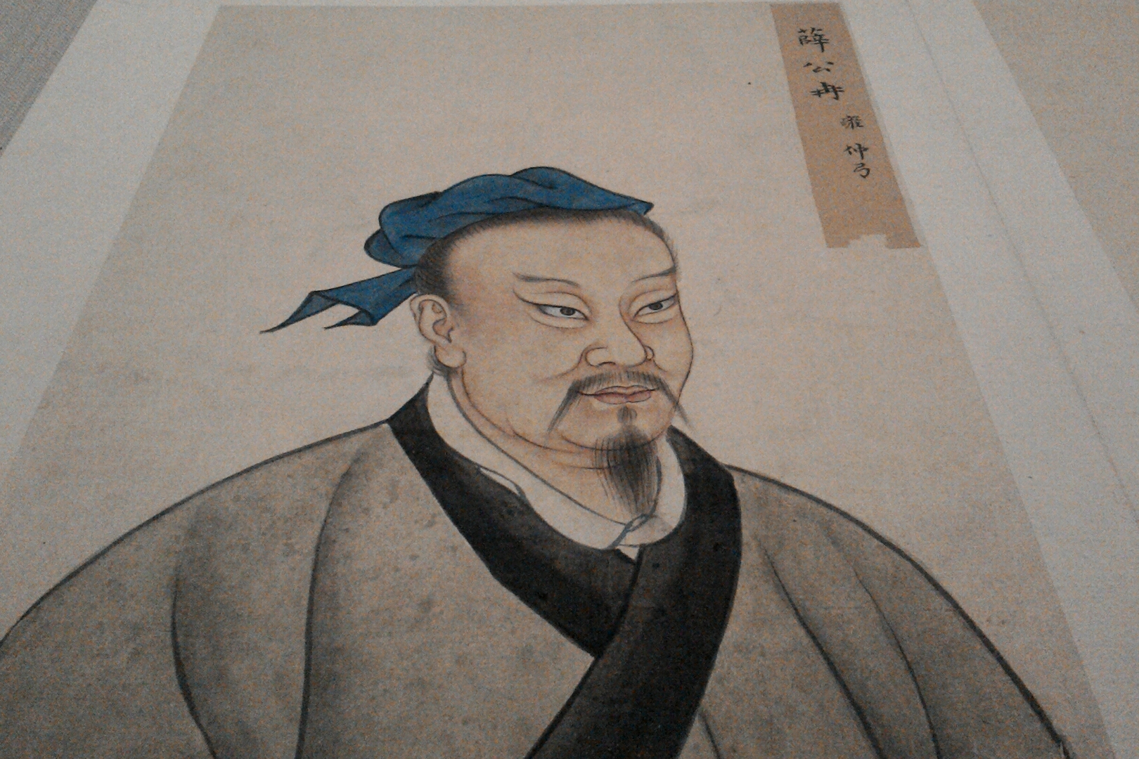 國立故宮博物院藏冉雍像,台北市士林區陽明山次分區臨溪里